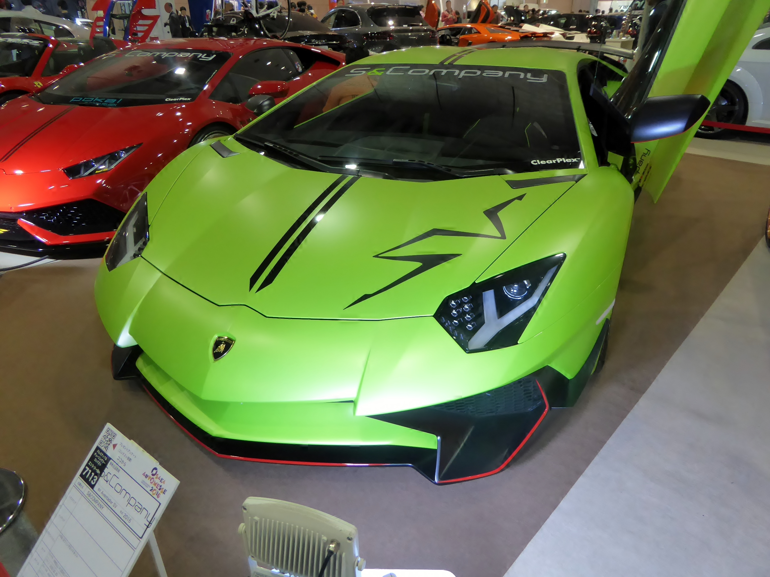 大阪オートメッセ2016においてS&COMPANYが出展したランボルギーニ・アヴェンタドールLP750-4 SVを撮影。